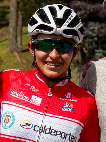 Tatiana Dueñas en la 1ra etapa de la Vuelta Femenina a Colombia 2018